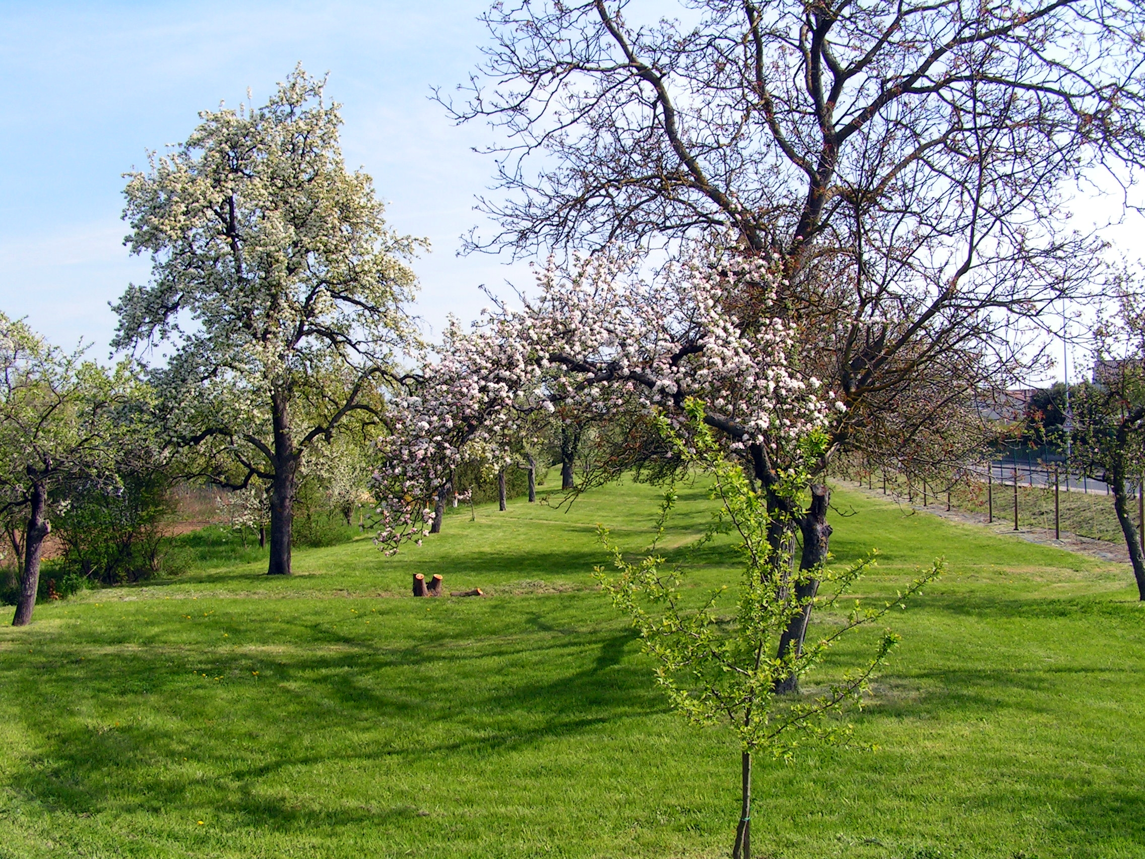 Jardin, Rue du Jardin Roussel, Seichamps, Meurthe-et-Moselle, France